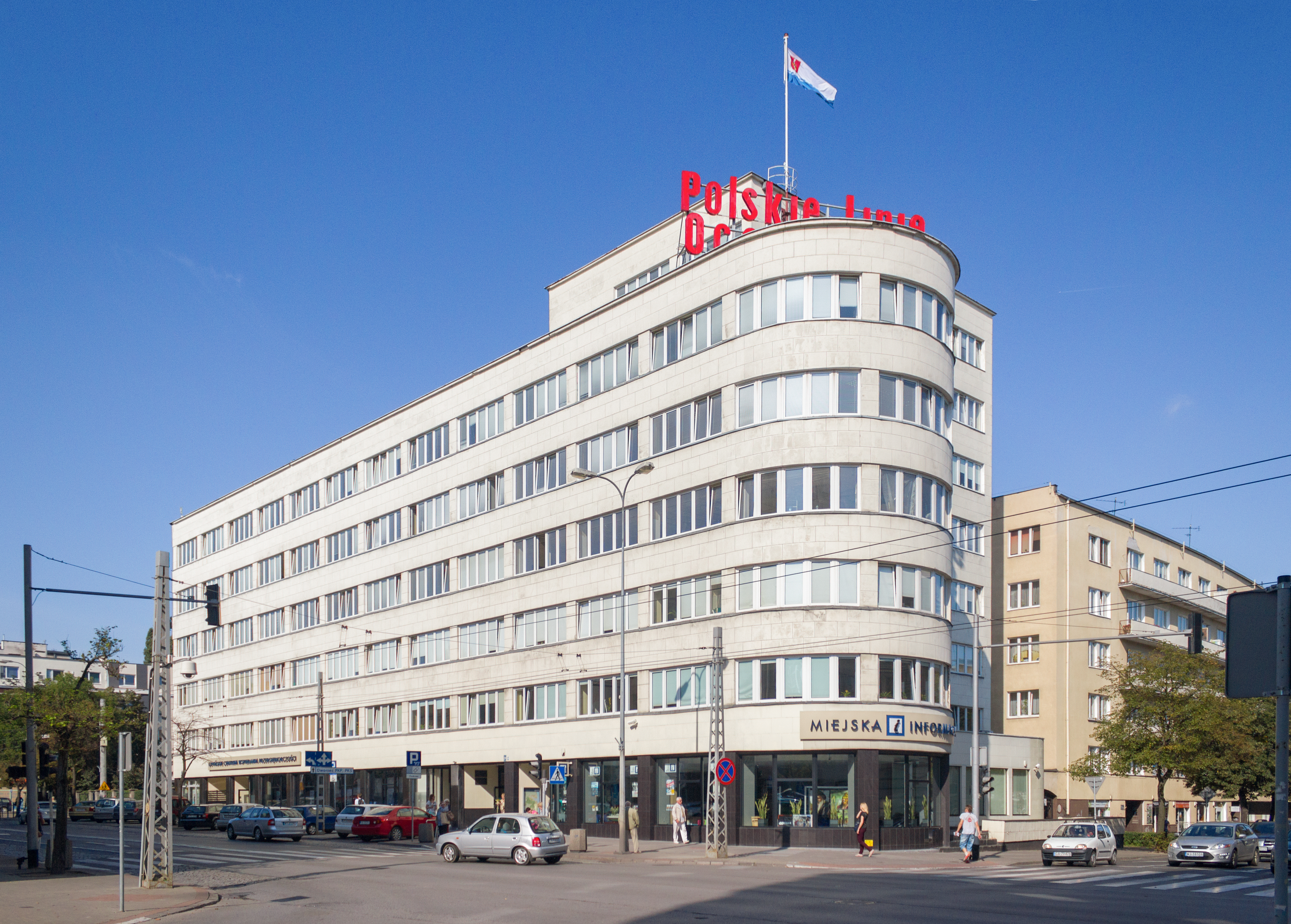 Gdynia Śródmieście, ul. 10 Lutego 24 - Siedziba Zakładu Ubezpieczeń i PLO ("Polskie Linie Oceaniczne")